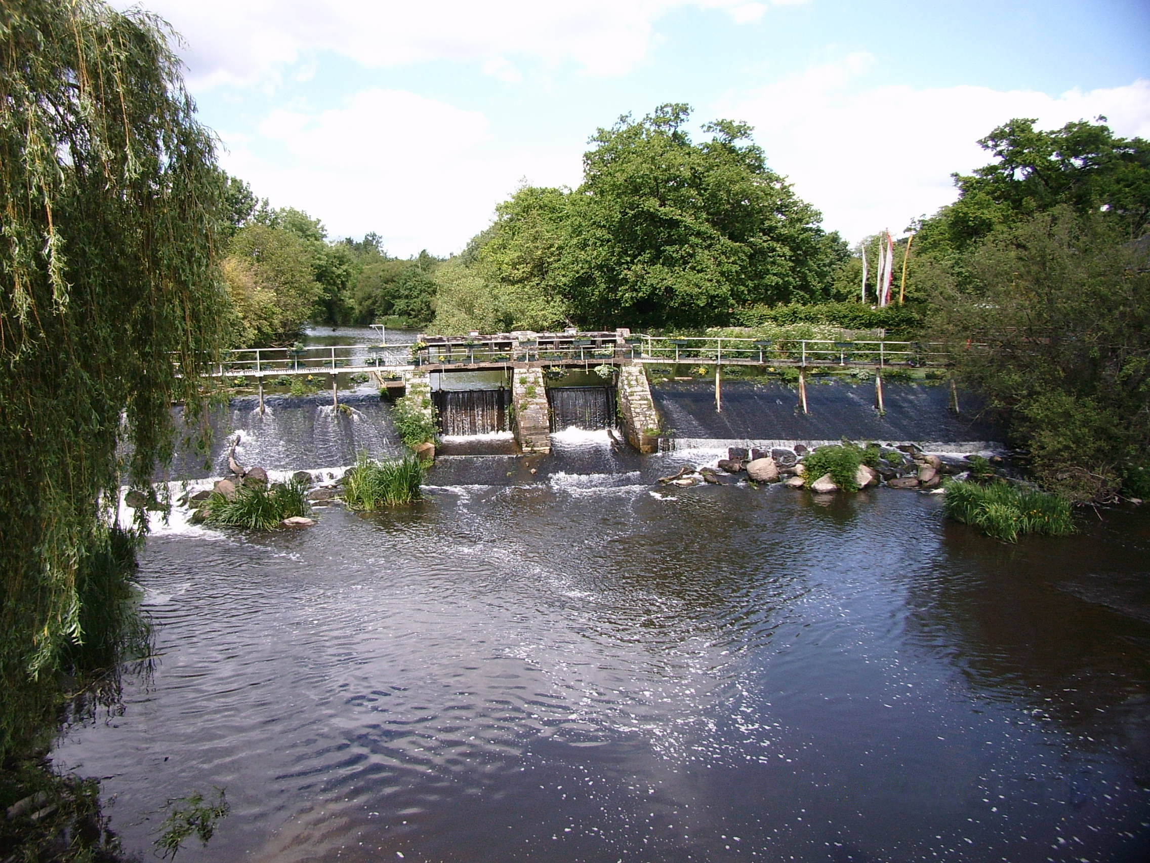 Der Fluss Aff bei La Gacilly, Bretagne, Frankreich